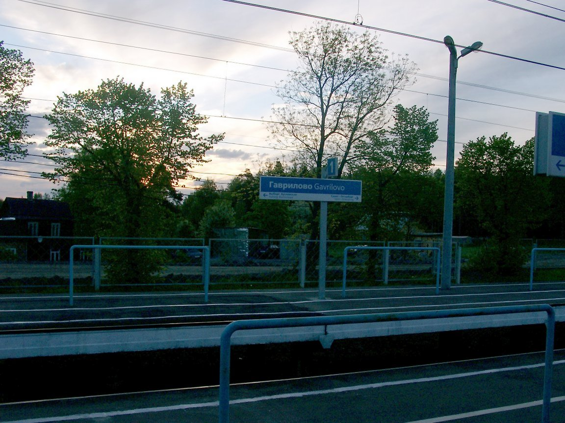 Железнодорожная станция Гаврилово, Ленинградская область, Россия.